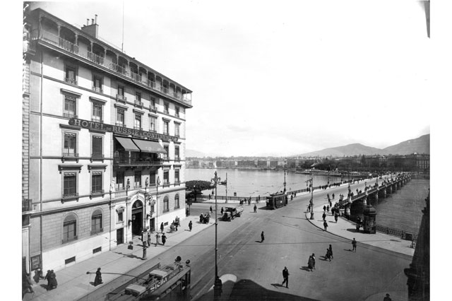 Frank Henri Jullien (1882-1938), L’hôtel de Russie et le pont du Mont-Blanc, 31 mai 1923, négatif noir et blanc sur verre au gélatino-bromure d’argent, 18 x 24 cm, inv. VG N 18 x 24 4127